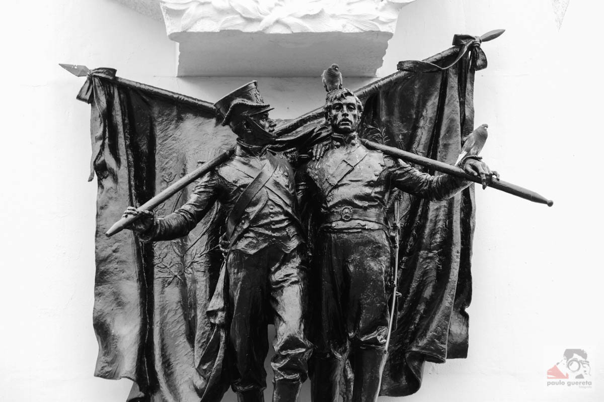 Lima - Perú